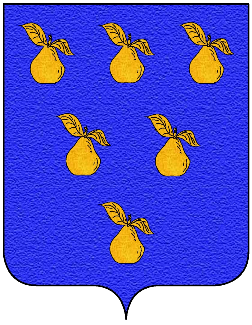 Stemma della famiglia Peruzzi (Firenze)